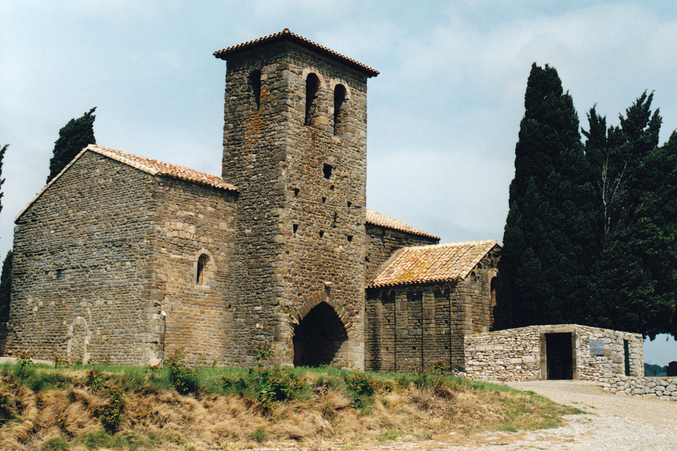 France - Aude - Montbrun-des-Corbières - Chapelle Notre-Dame-de-Colombier